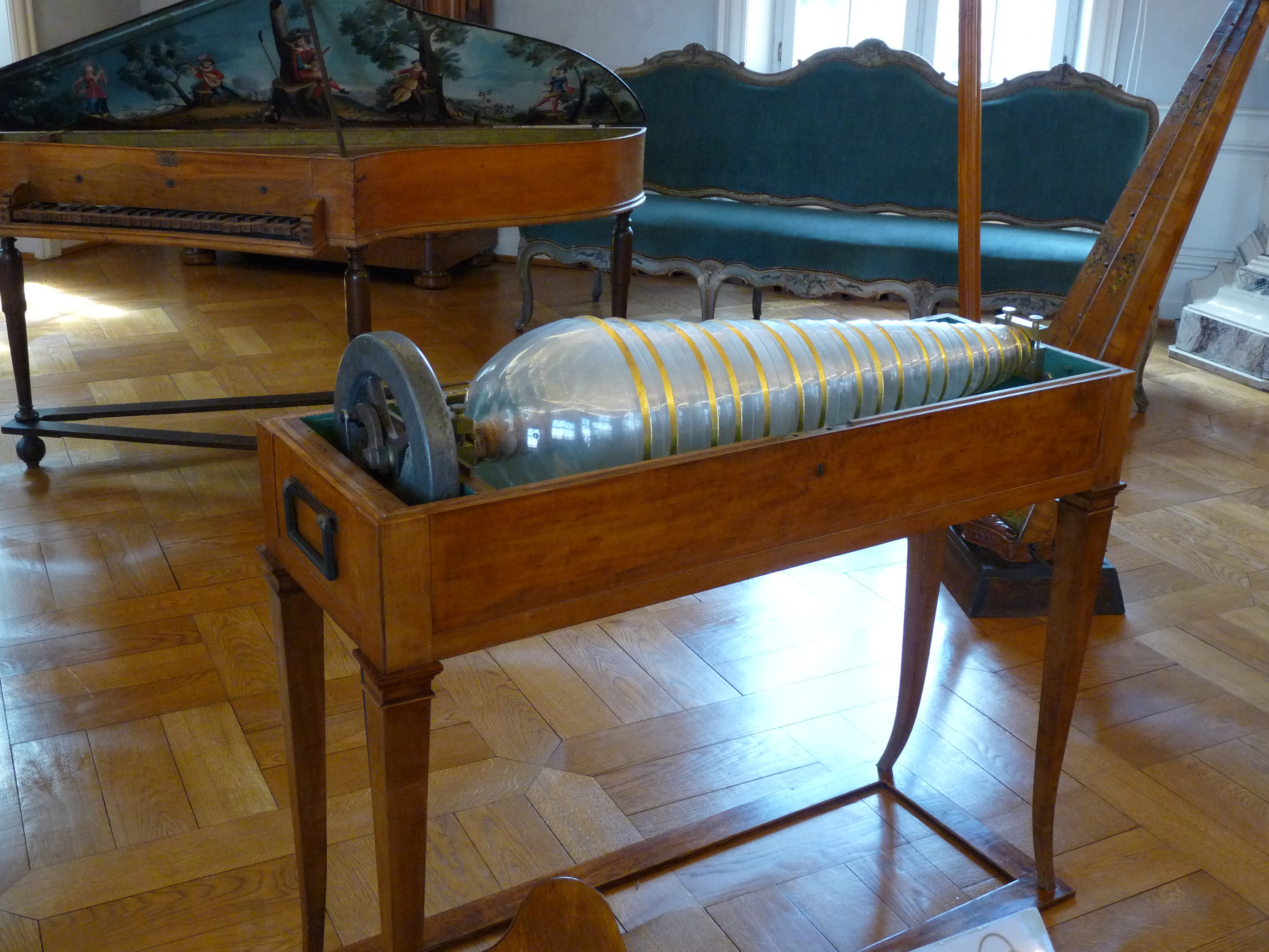 Musée Unterlinden (Colmar), salle des Demoiselles anglaises : armonica de verre, atelier Abresch de Karlsruhe, 1805, bâti en résineux, placage en citronnier, bois, verre, laiton, métal et dorure. Le pédalier et sa base ont été rajoutés lors de la restauration de l'instrument en 2006.